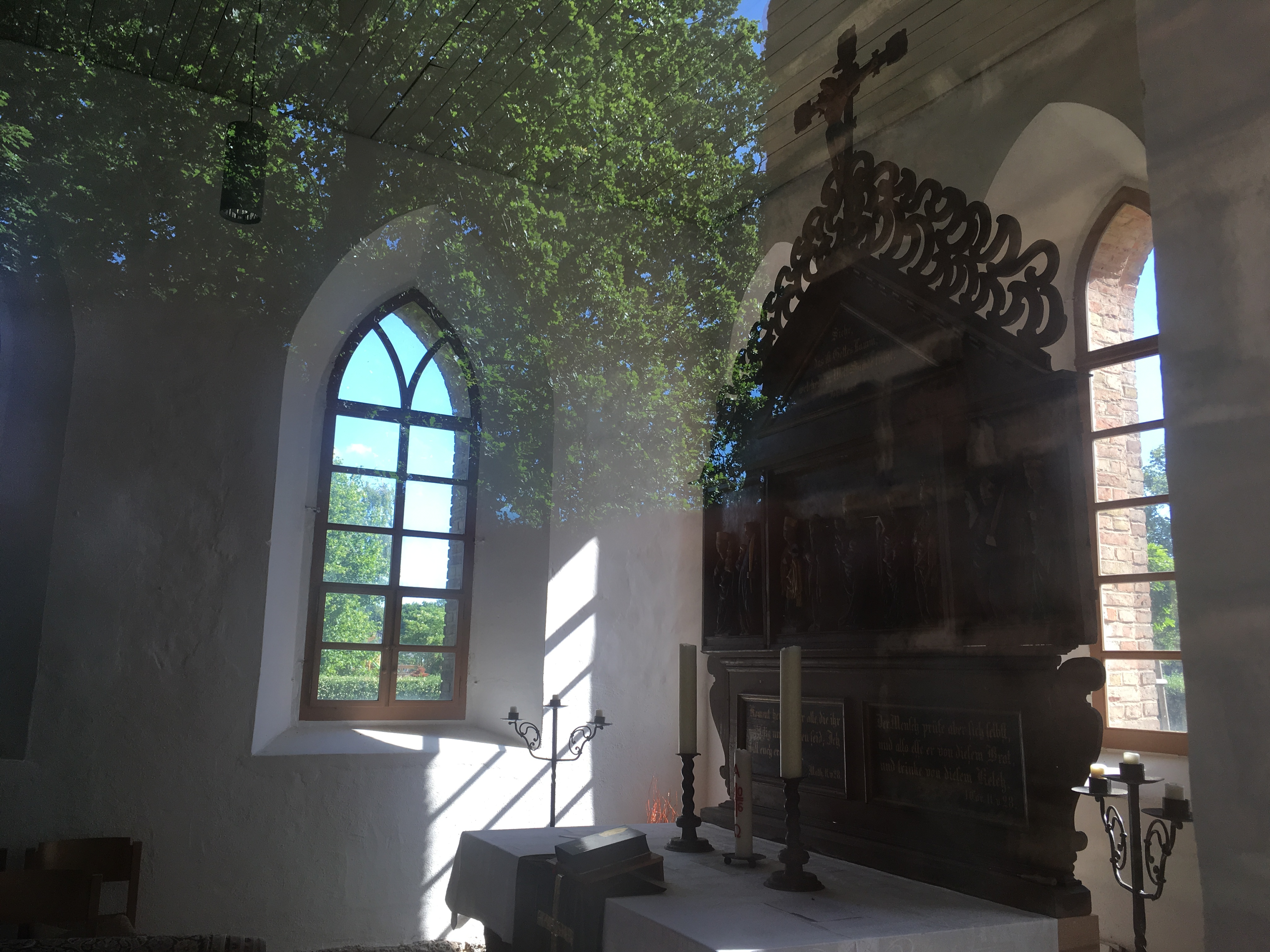 Die Dorfkirche in Brusendorf, Stadt Mittenwalde, entstand Anfang des 14. Jahrhunderts aus Feldsteinen. 1871 ließ die Kirchengemeinde die Fenster vergrößert und riss den Kirchturm ab. Im Innern ist ein Altarretabel mit zwei gotischen Schnitzfiguren.